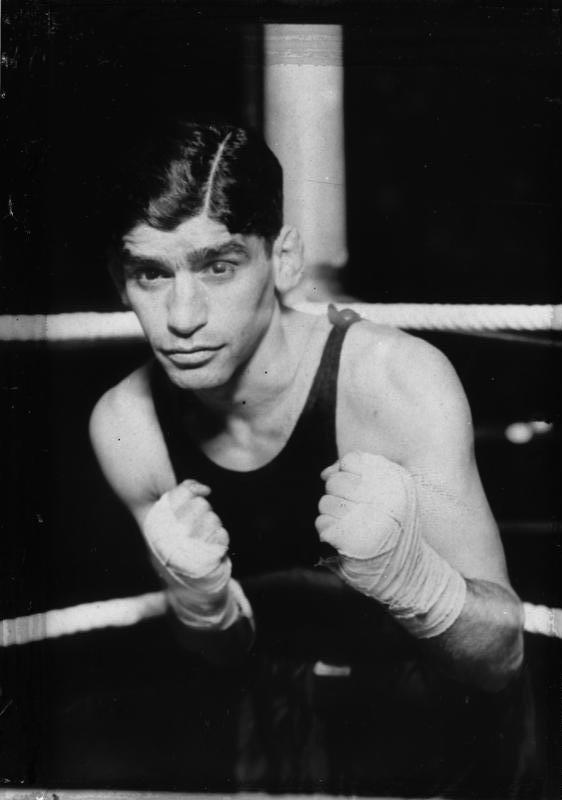 Der neue Boxweltmeister im Fliegengewicht Pladner ! Der geschlagene Weltmeister im Fliegengewicht Izzy Schwartz.